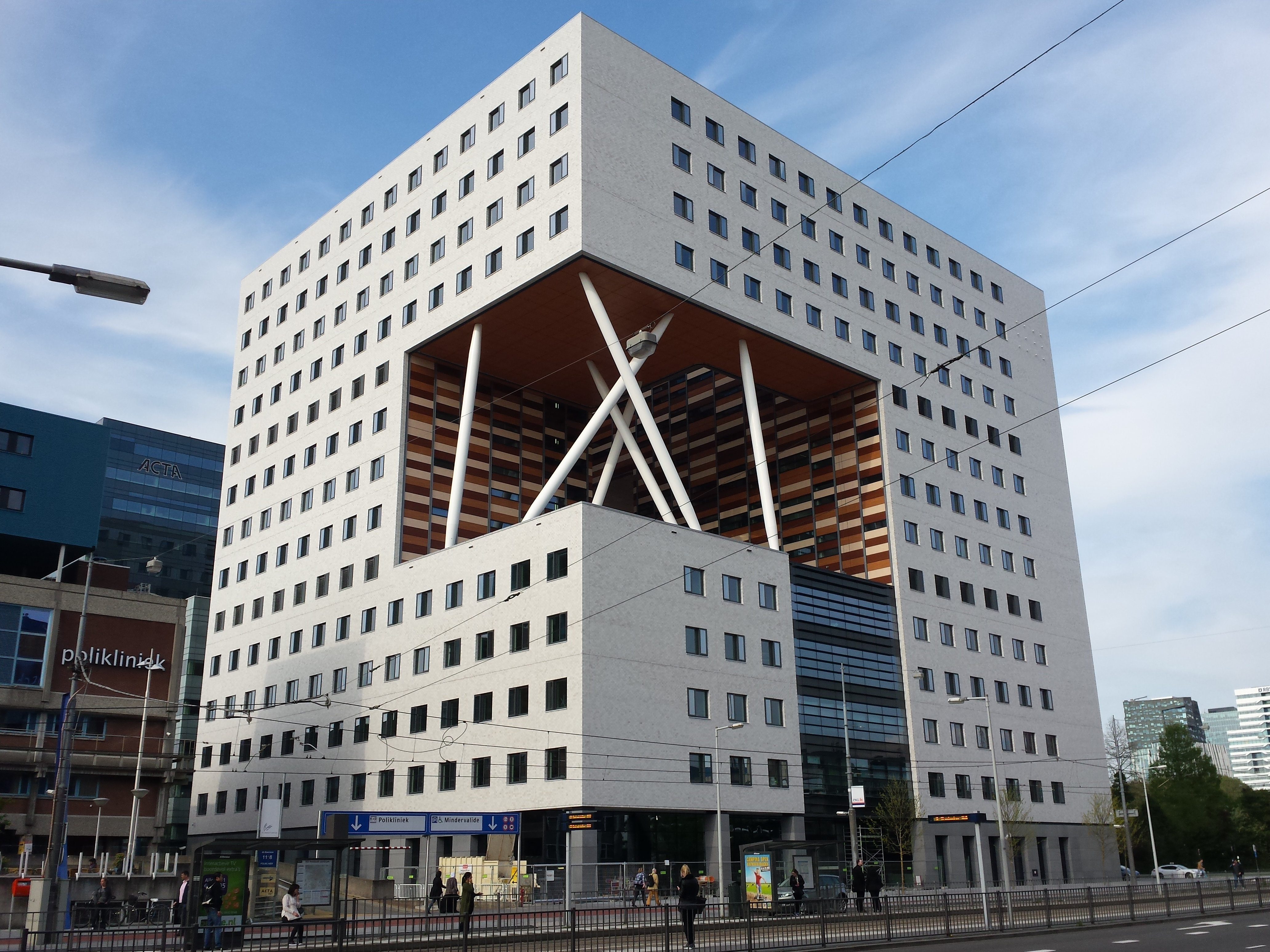 Zuidas, Amsterdam, Netherlands